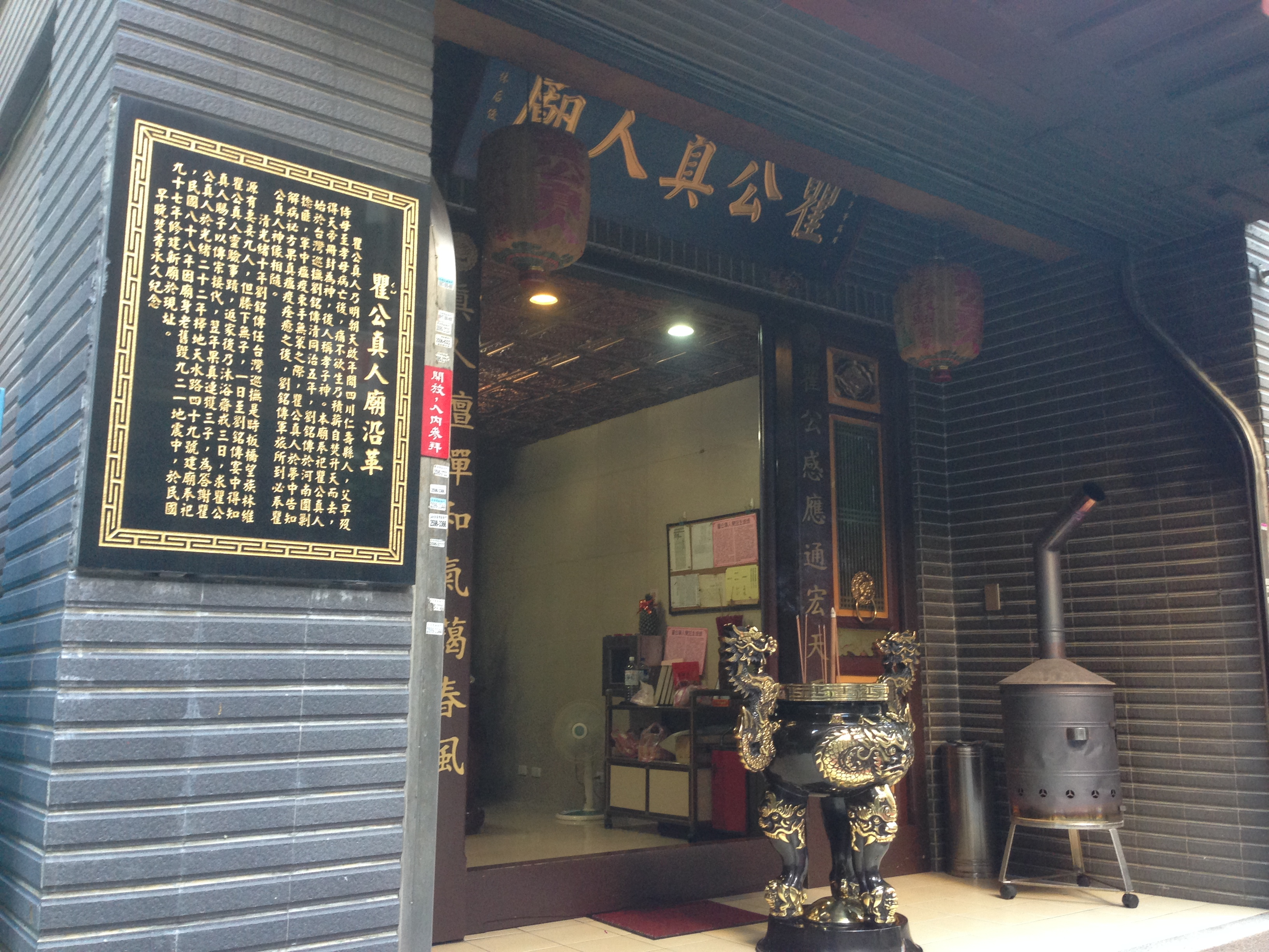 中文（台灣）: 瞿公真人廟與沿革